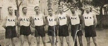 Η πρώτη ομάδα βόλεϊ της ΑΕΚ το 1932